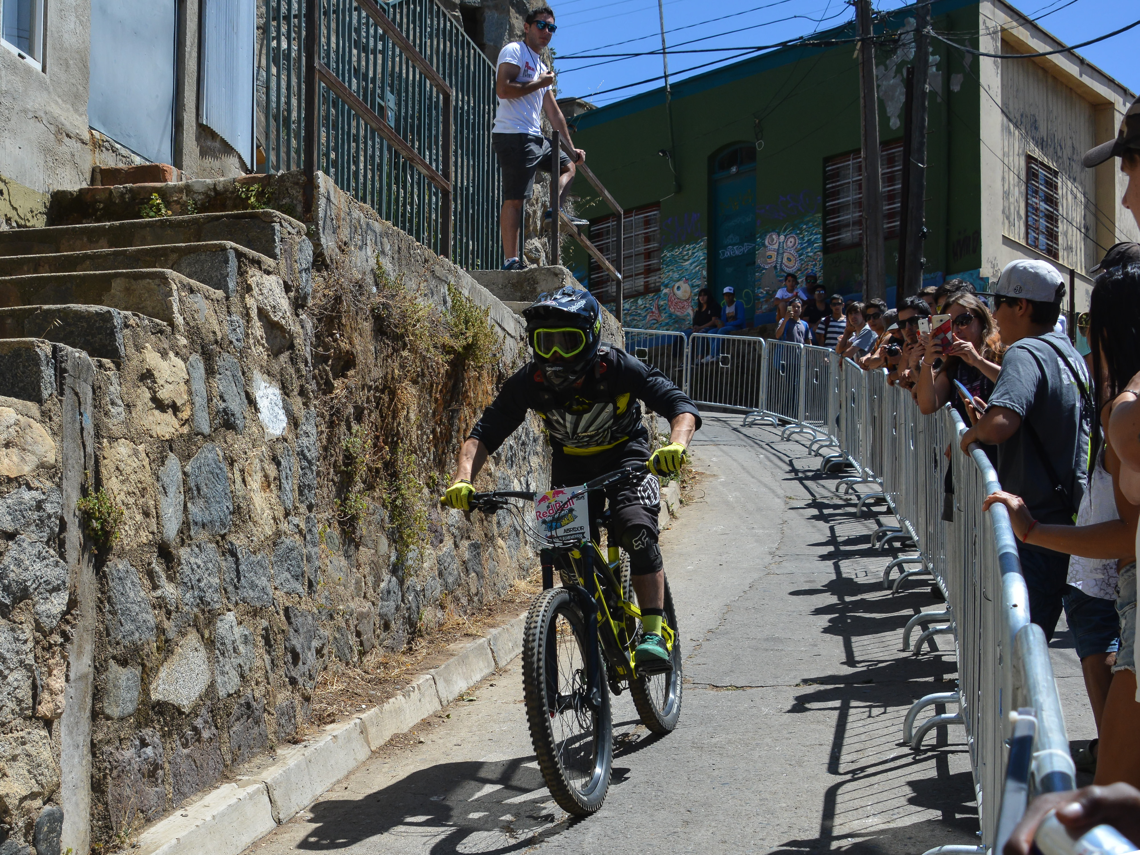 Rexner Echeverría en Valparaíso Cerro Abajo 2018, Chile.